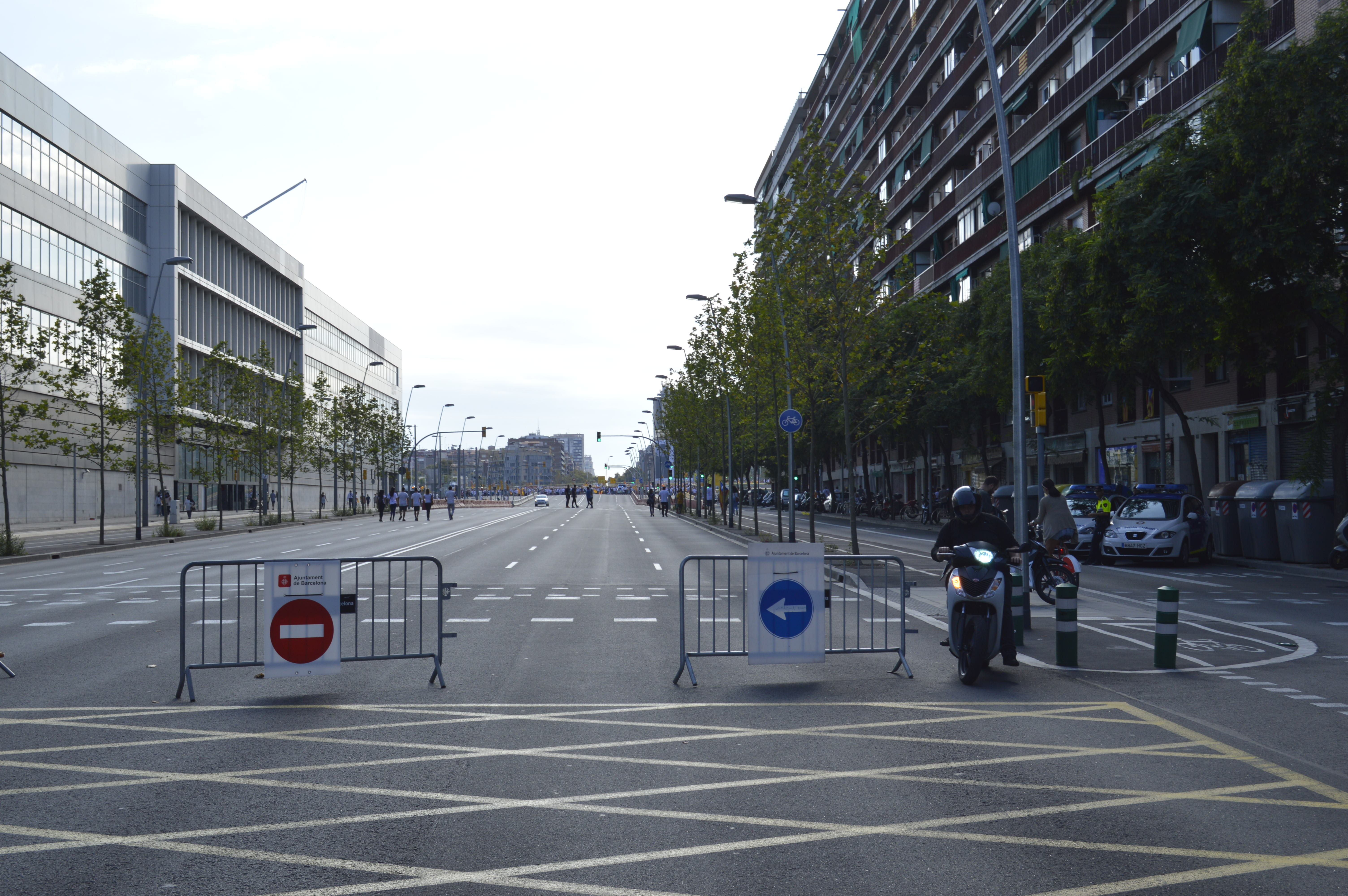 ViaLliure Meridiana: Talls de trànsit